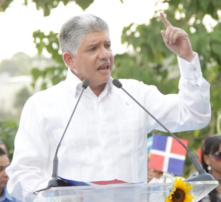 Eduardo Estrella en Dajabon